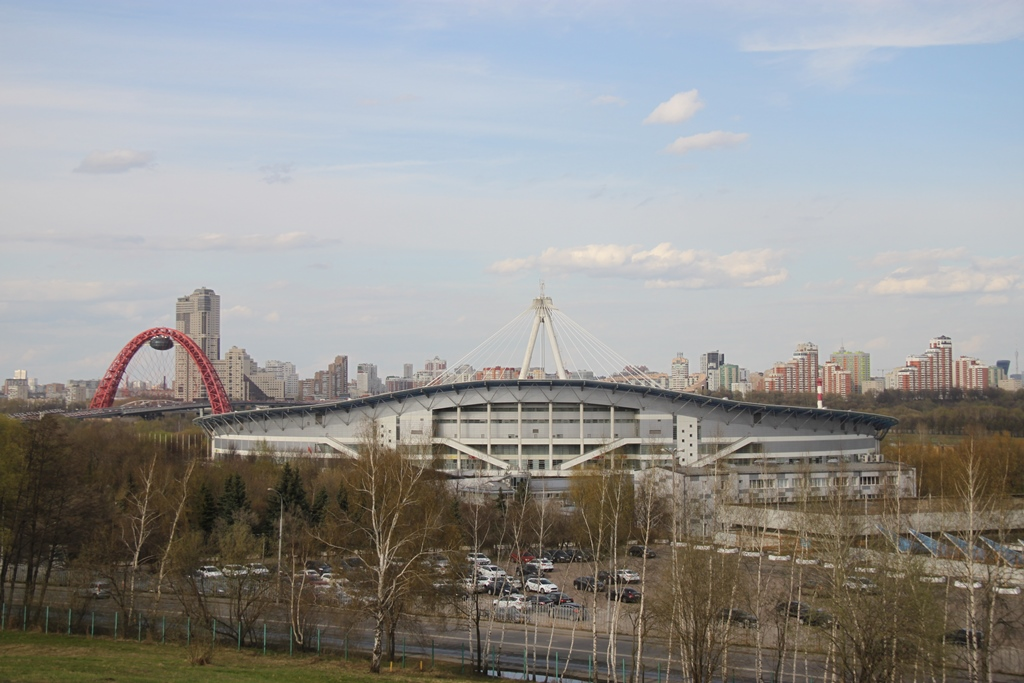 Ледовый "дворец" в Крылатском. На дальнем плане - панорама застройки проспекта Жукова и Карамышевской набережной